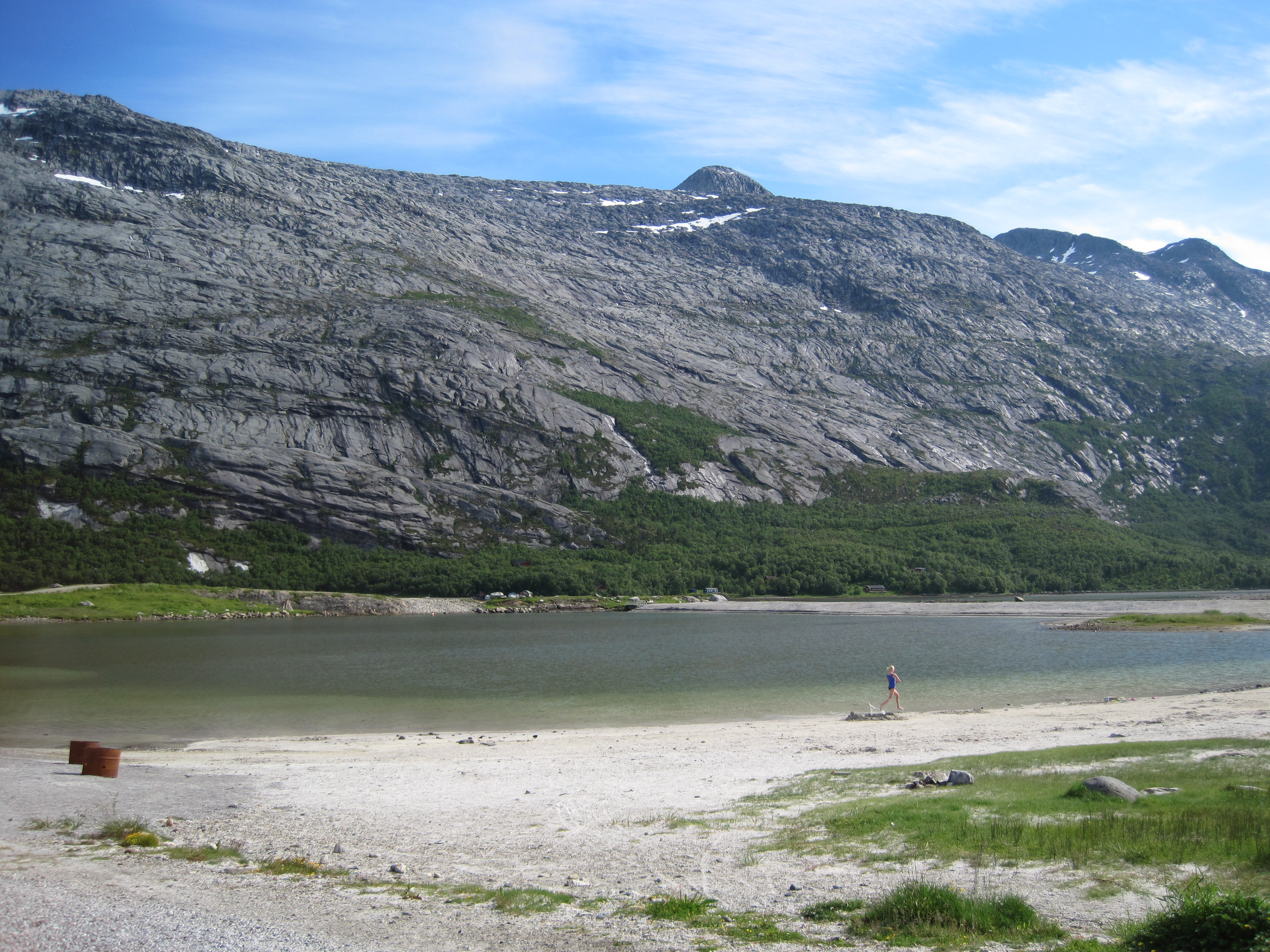 Beliggenhet: Botn